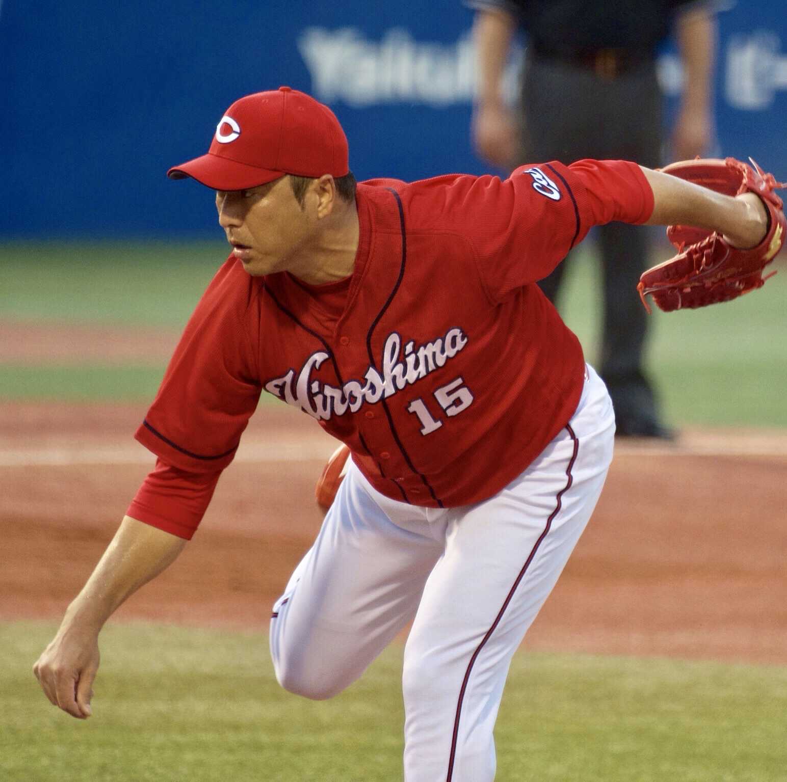 広島東洋カープ 背番号１５ 黒田博樹 ２０１６年９月３日撮影 神宮球場